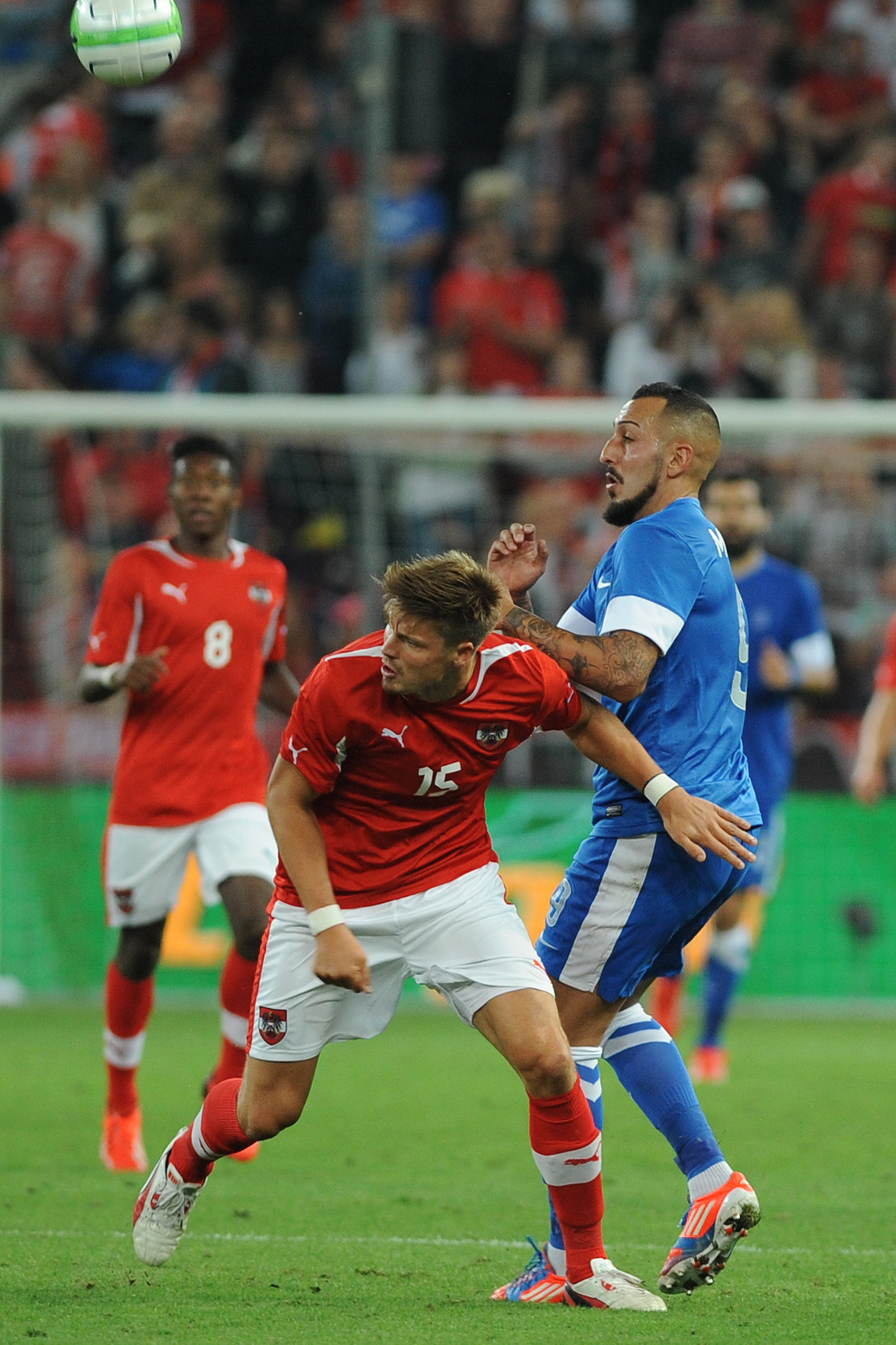 Freundschaftliches Länderspiel Österreich - Griechenland am 14. August 2013 in Salzburg: Sebastian Prödl, Kostas Mitroglou